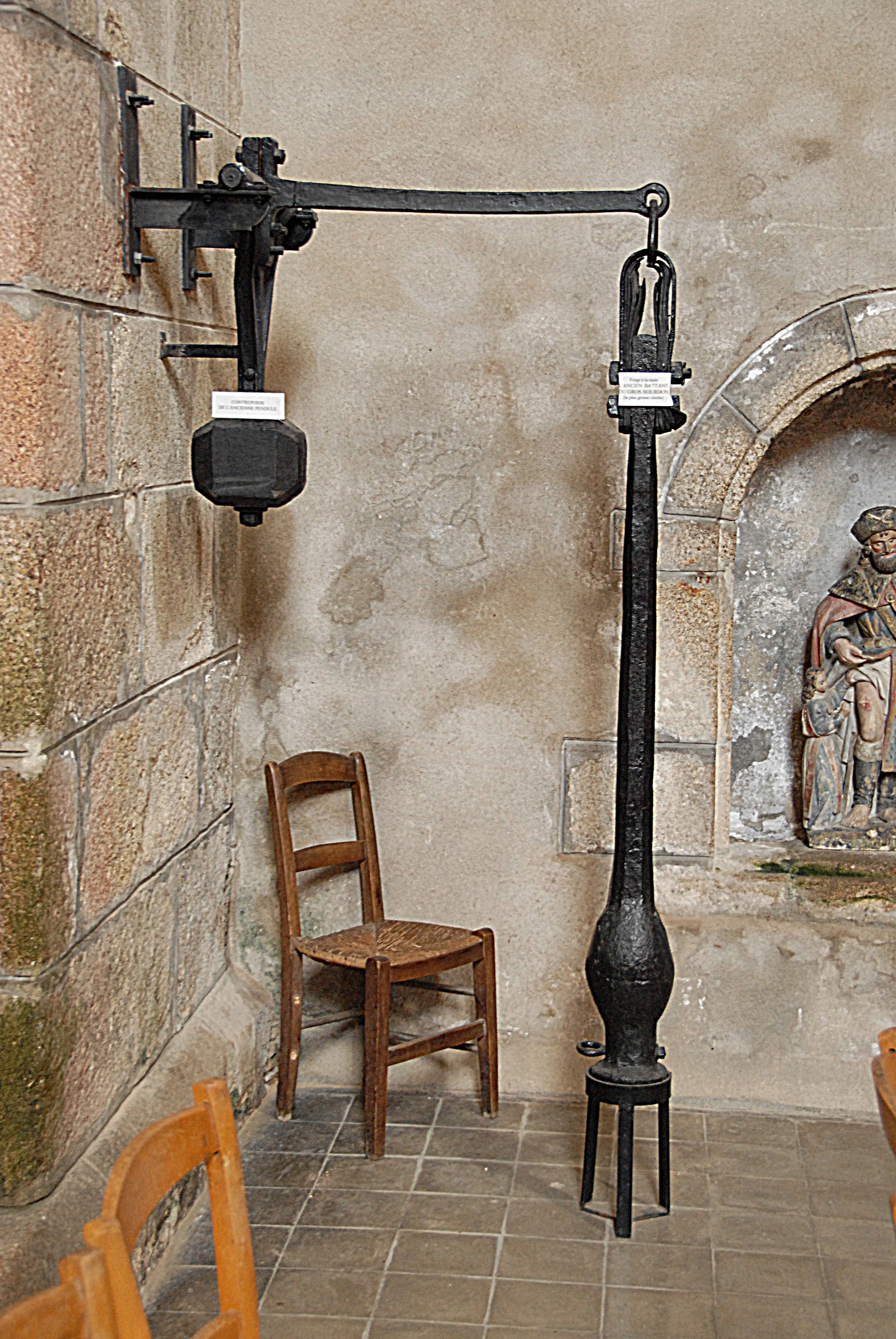 Stiftskirche St.-Léonard-de-Noblat, Glockenschlegel